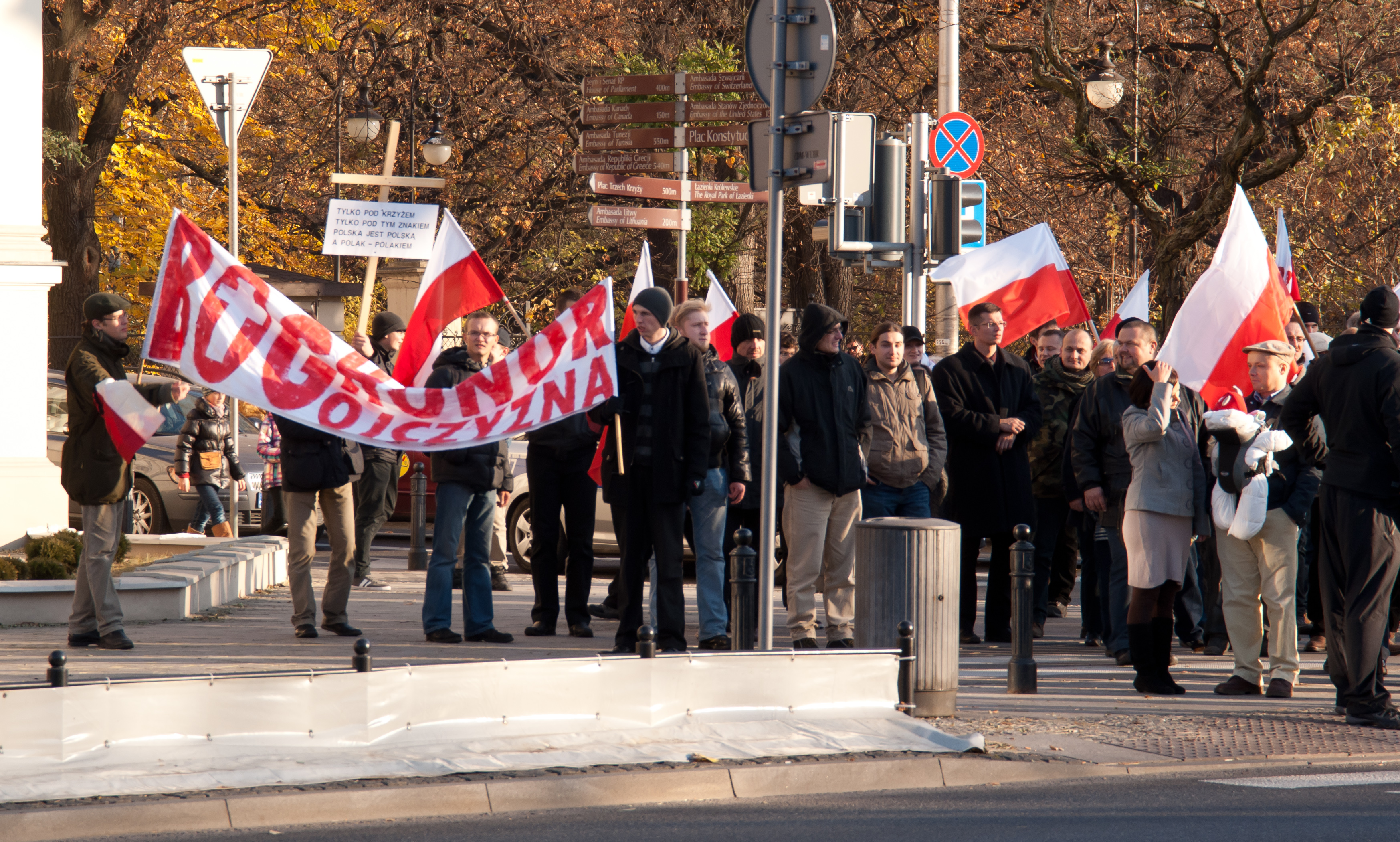 Uczestnicy Marszu Niepodległości kierujący się w stronę Placu Konstytucji, róg Alei Ujazdowskich i Pięknej. Warszawa, Marsz Niepodległości 2011